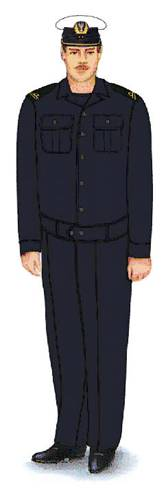 Ubiór wyjściowy żołnierza Marynarki Wojennej. Rozporządzenie Ministra Obrony Narodowej w sprawie wzorów oraz noszenia umundurowania i oznak wojskowych przez żołnierzy zawodowych i kandydatów na żołnierzy zawodowych.